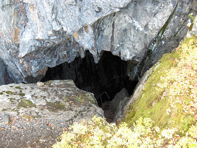 Inngangen til Fingalshula ligger sørvestvendt i et noe bratt og ulendt terreng